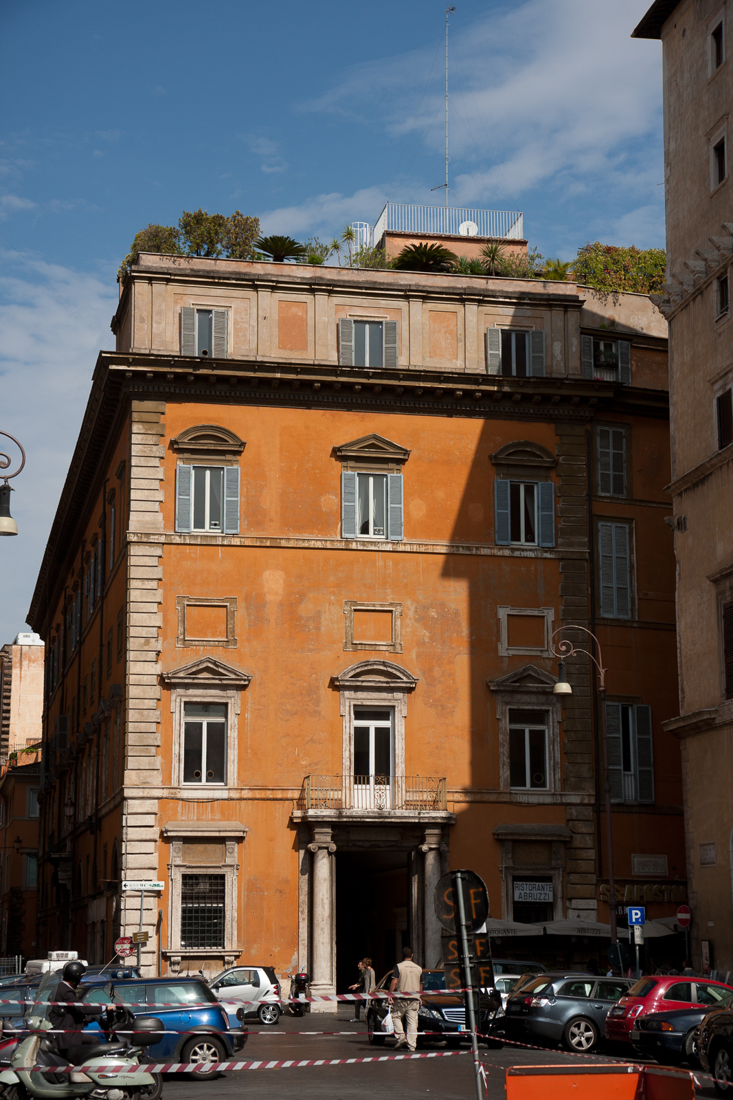 Palazzo Muti Papazzurri Balestra